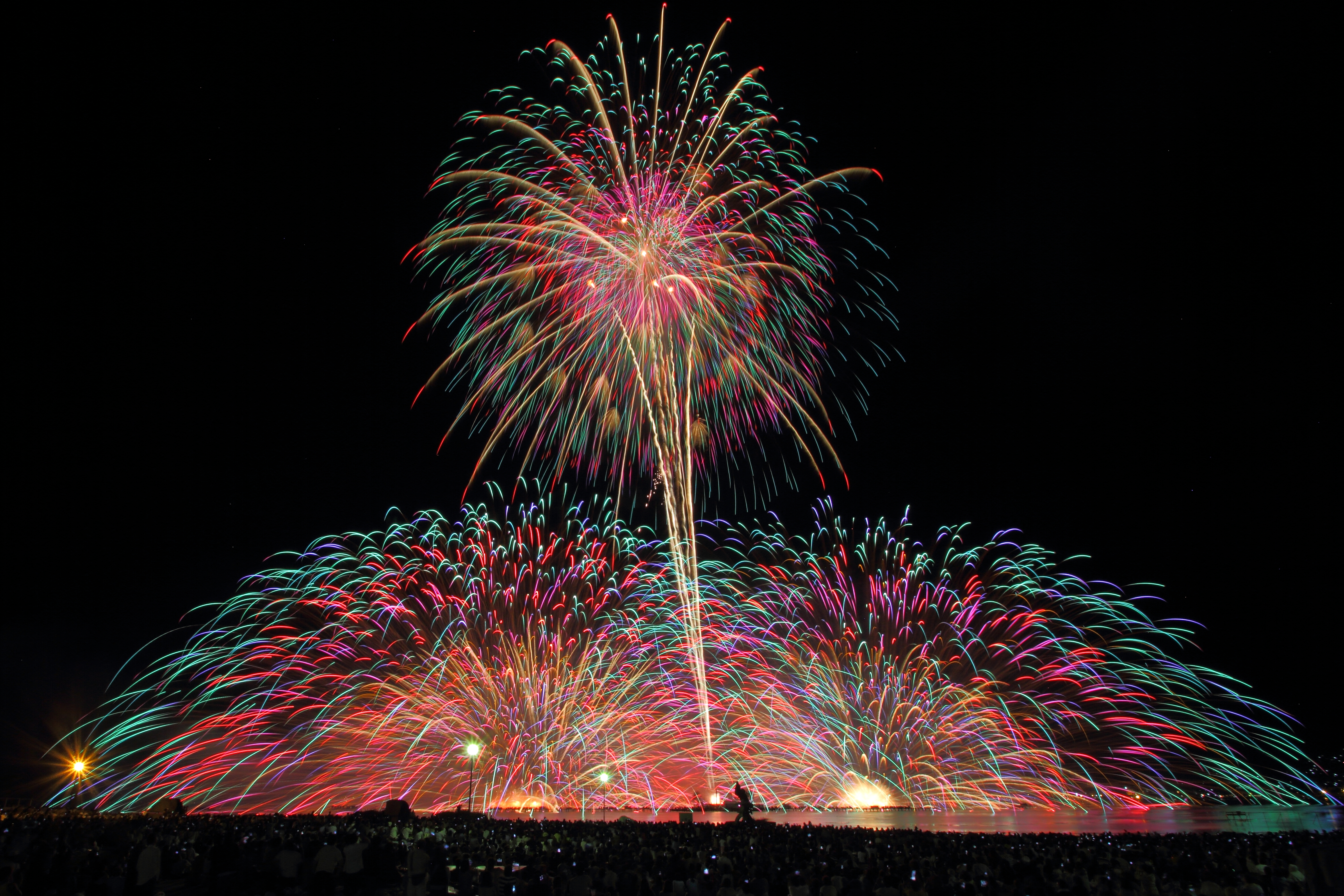 フィナーレ水上スターマイン